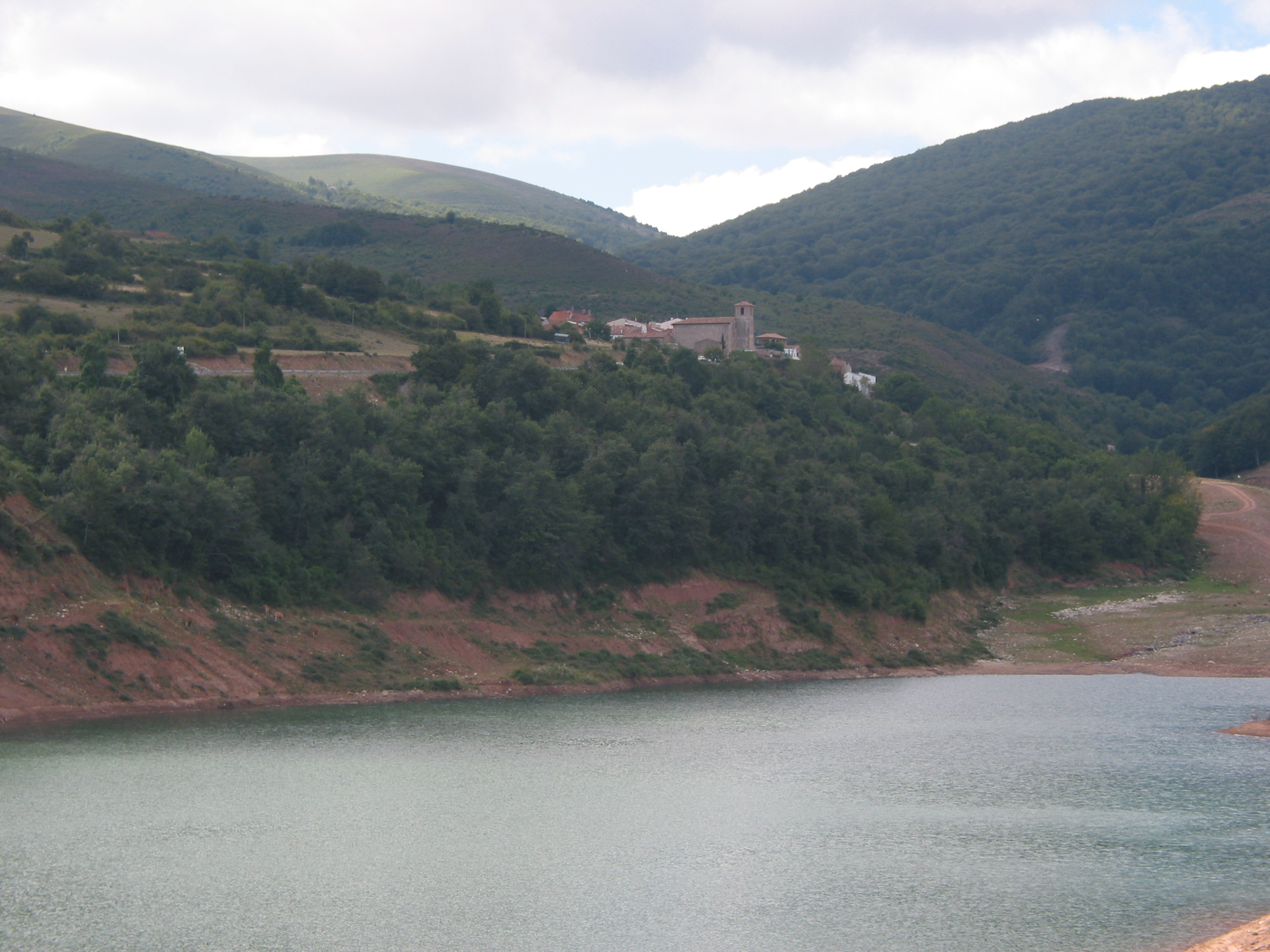 Vista de Castroviejo (La Rioja) desde la presa de Yalde